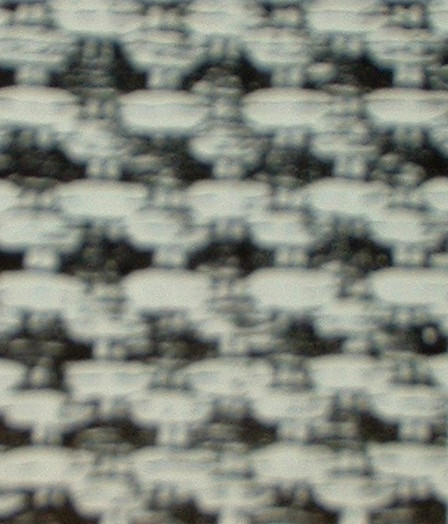 Gewebe in Panamabindung